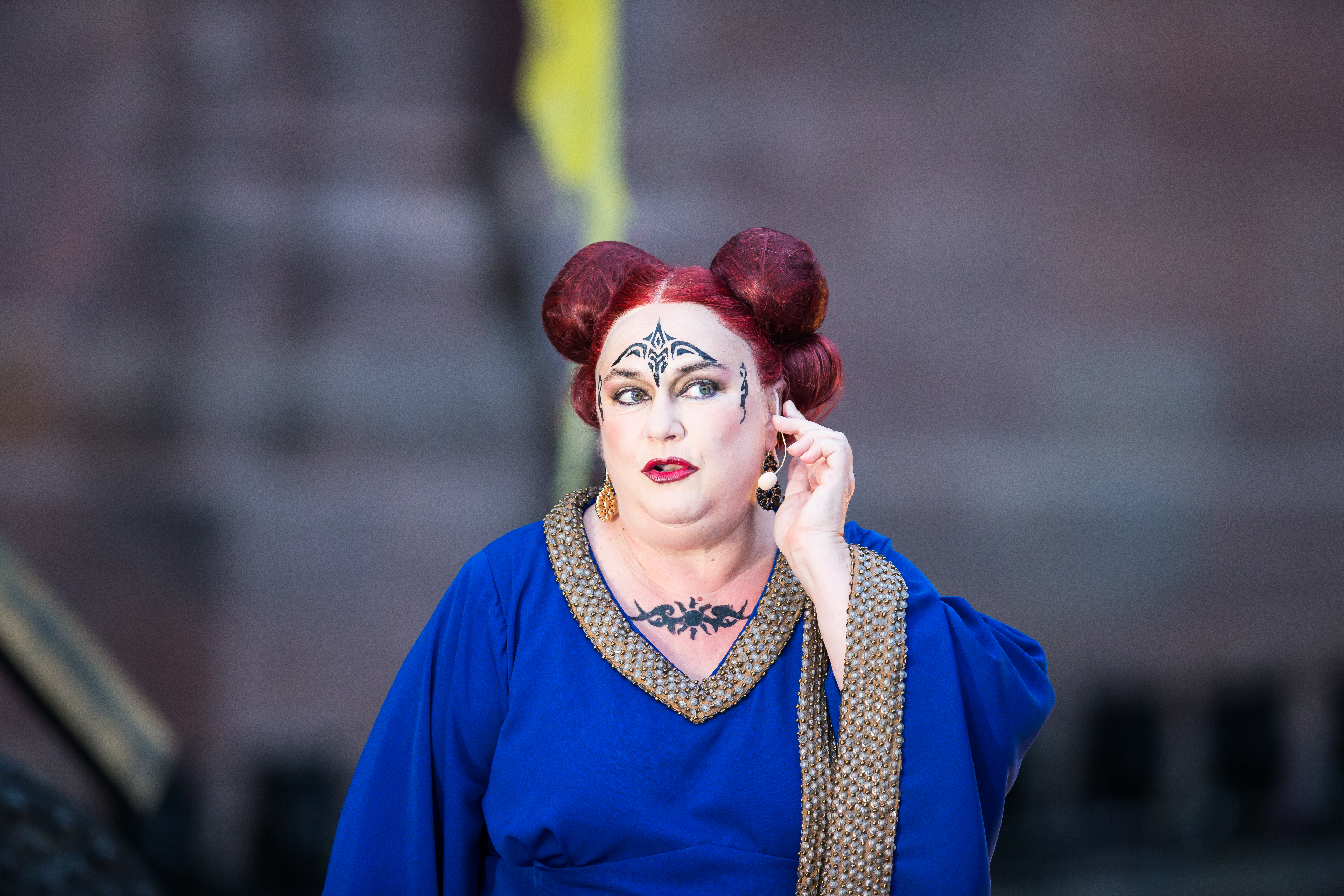 Nibelungenfestspiele Worms Gemetzel 2015 Nordseite Wormser Kaiserdom Nico Hofmann (Intendant), Albert Ostermaier (Autor), Thomas Schadt (Regisseuer) Enemble: Alina Levshin (Ortlieb), Maik Solbach (Narr), Judith Rosmair (Kriemhild), Catrin Striebeck (Brünhild), Markus Boysen (Etzel), Heiko Pinkowski (Dietrich), Max Urlacher (Hagen), Holger Kunkel (Gunter), Gabriel Raab (Gernot), Peter Becker (Giselher), Tom Radisch (Volker), Marion Breckwoldt (Zofe), Radu Cojocariu (Erzähler)